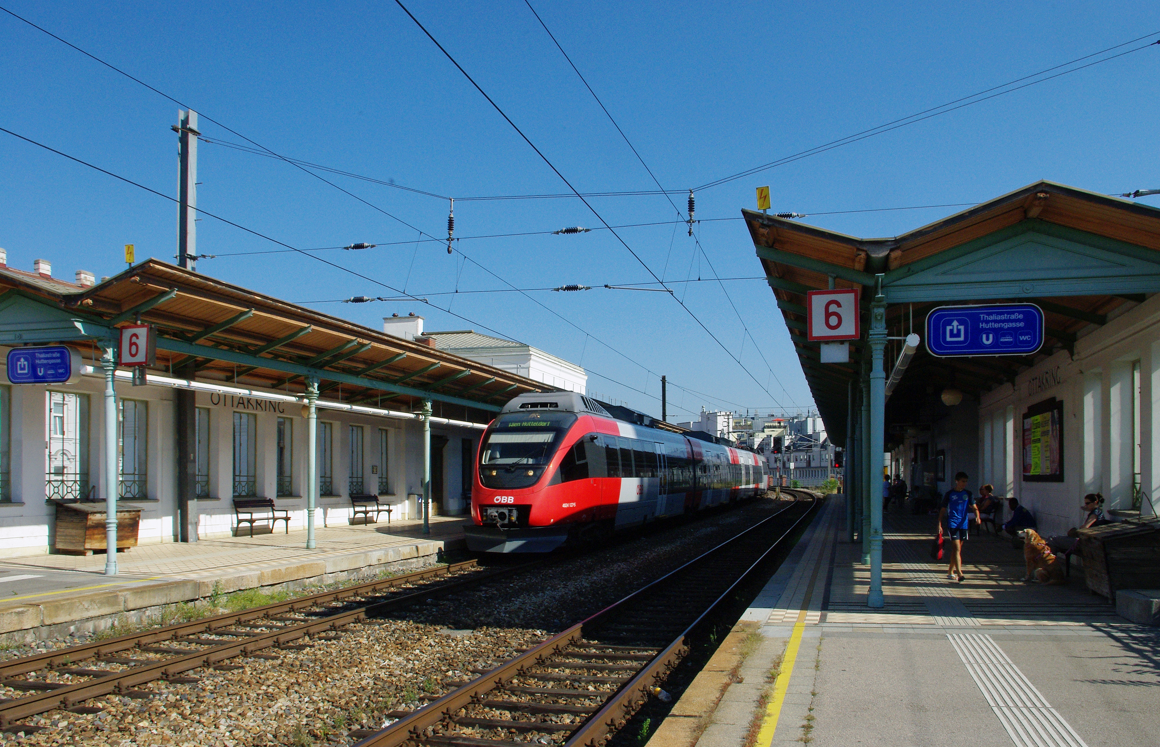 4024 127-5 in Wien Ottakring Richtung Wien Hütteldorf, Blick vom Bahnsteig Richtung Wien Handelskai